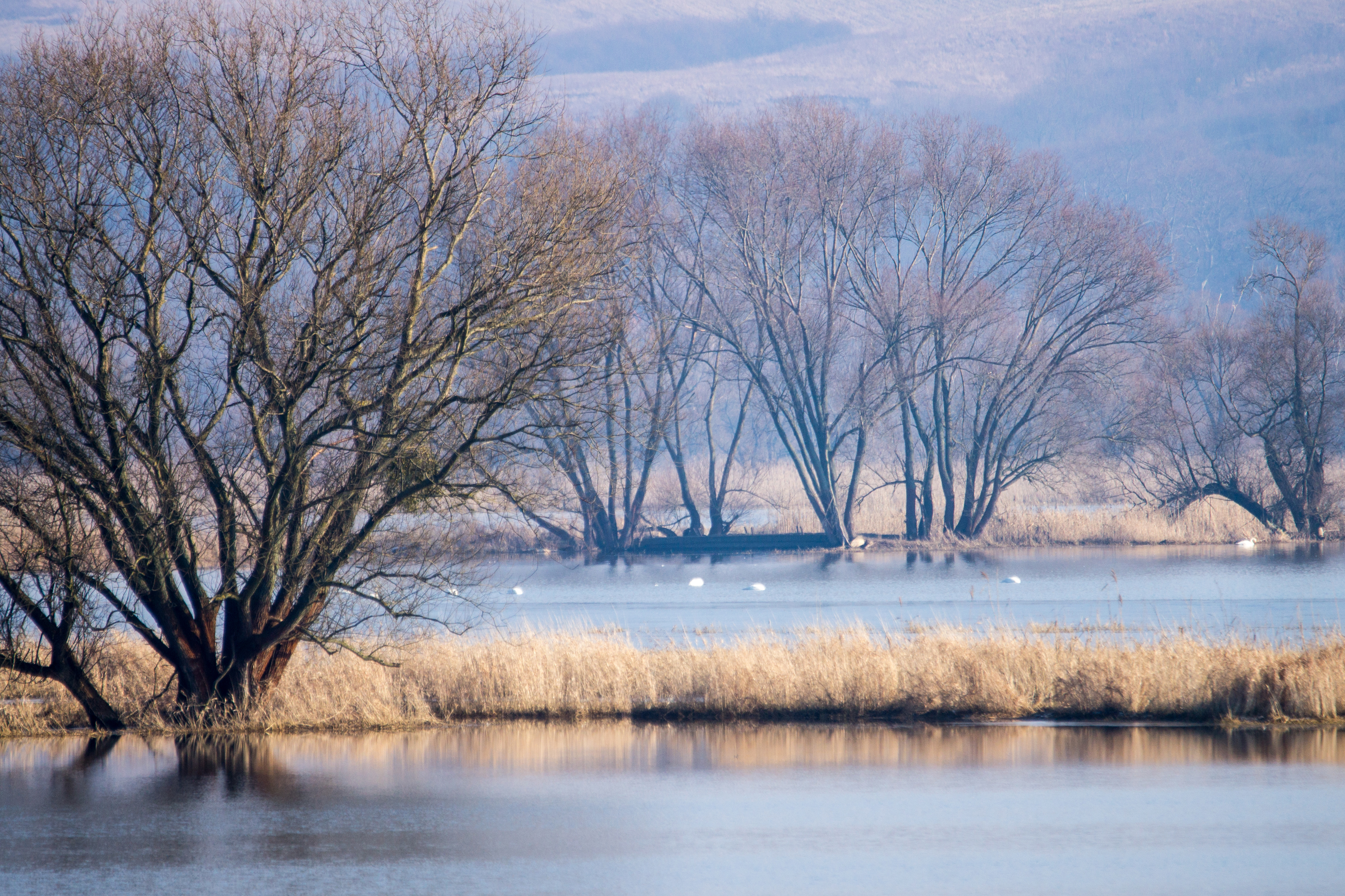 Dieses Bild ist zu den Singschwantagen in Criewen im Unteren Odertal entstanden